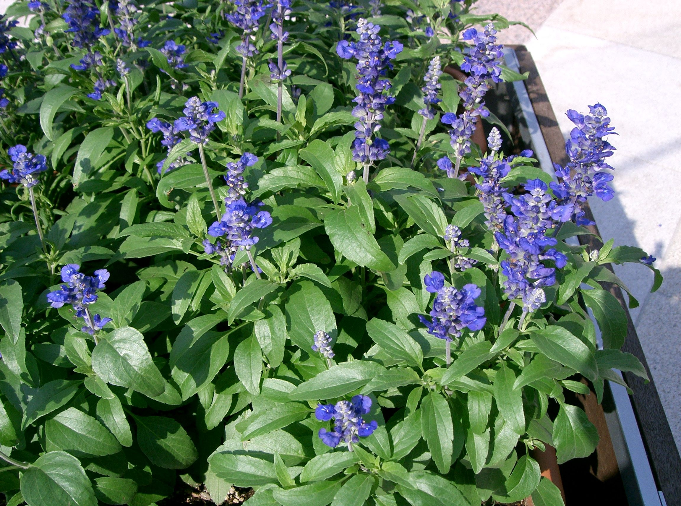 Salvia farinacea